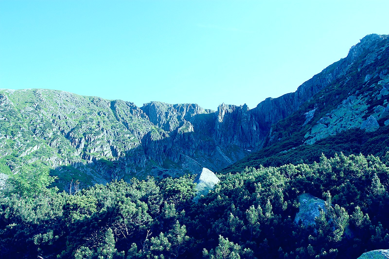 Śnieżne Kotły